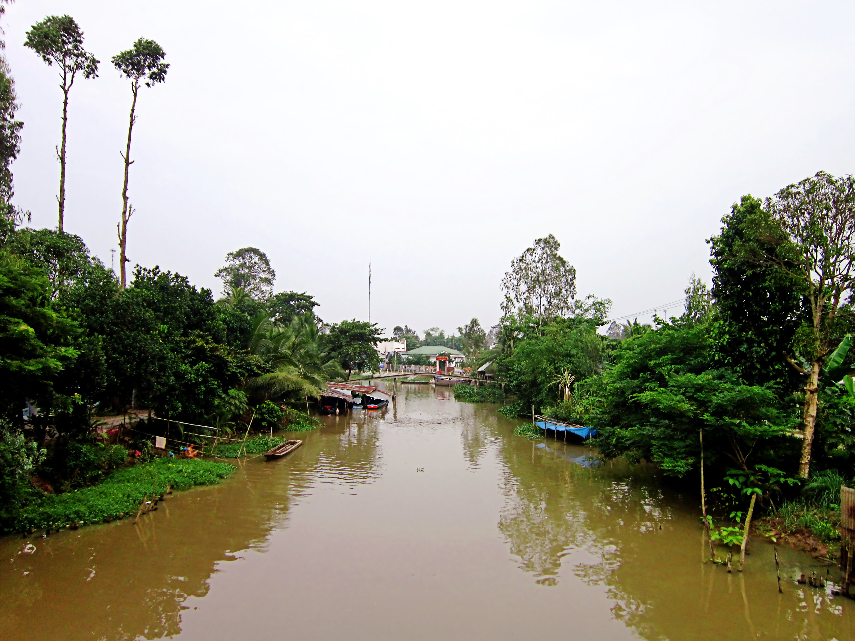 Con rạch nhỏ chảy qua trung tâm xã Vĩnh Chánh, thuộc huyện Thoại Sơn, An Giang, Việt Nam. Cuối ảnh là Ủy ban nhân dân xã.